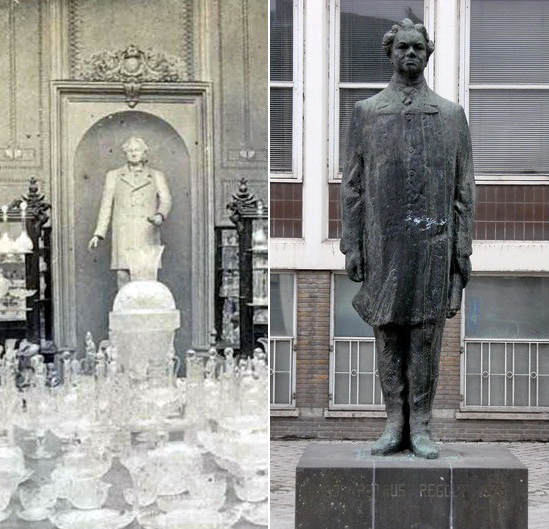 Collage van twee foto's van beelden van de Maastrichtse ondernemer en fabrieksstichter Petrus Regout (1801-1878). Het niet meer bestaande gipsen beeld (links) stond ooit in de toonzaal van glas en kristal in de Timmerfabriek. Het bronzen beeld (rechts) van Wim van Hoorn uit 1965 staat voor het voormalige Sphinxkantoor in de Boschstraat. Collage van twee rechtenvrije afbeeldingen op Wikimedia Commons: File:Kristalfabriek magazijn van fijn glaswerk, Bestanddeelnr 256-3973.jpg File:Petrus Regout Statue.JPG